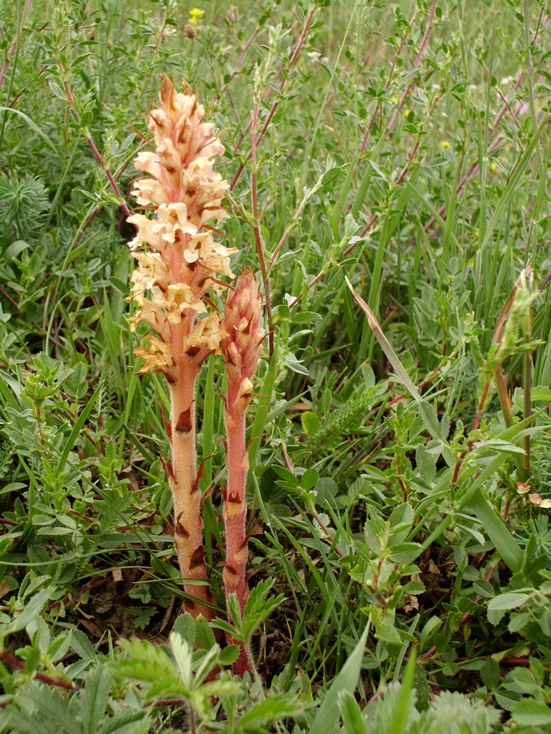 Zaraza czerwonawa